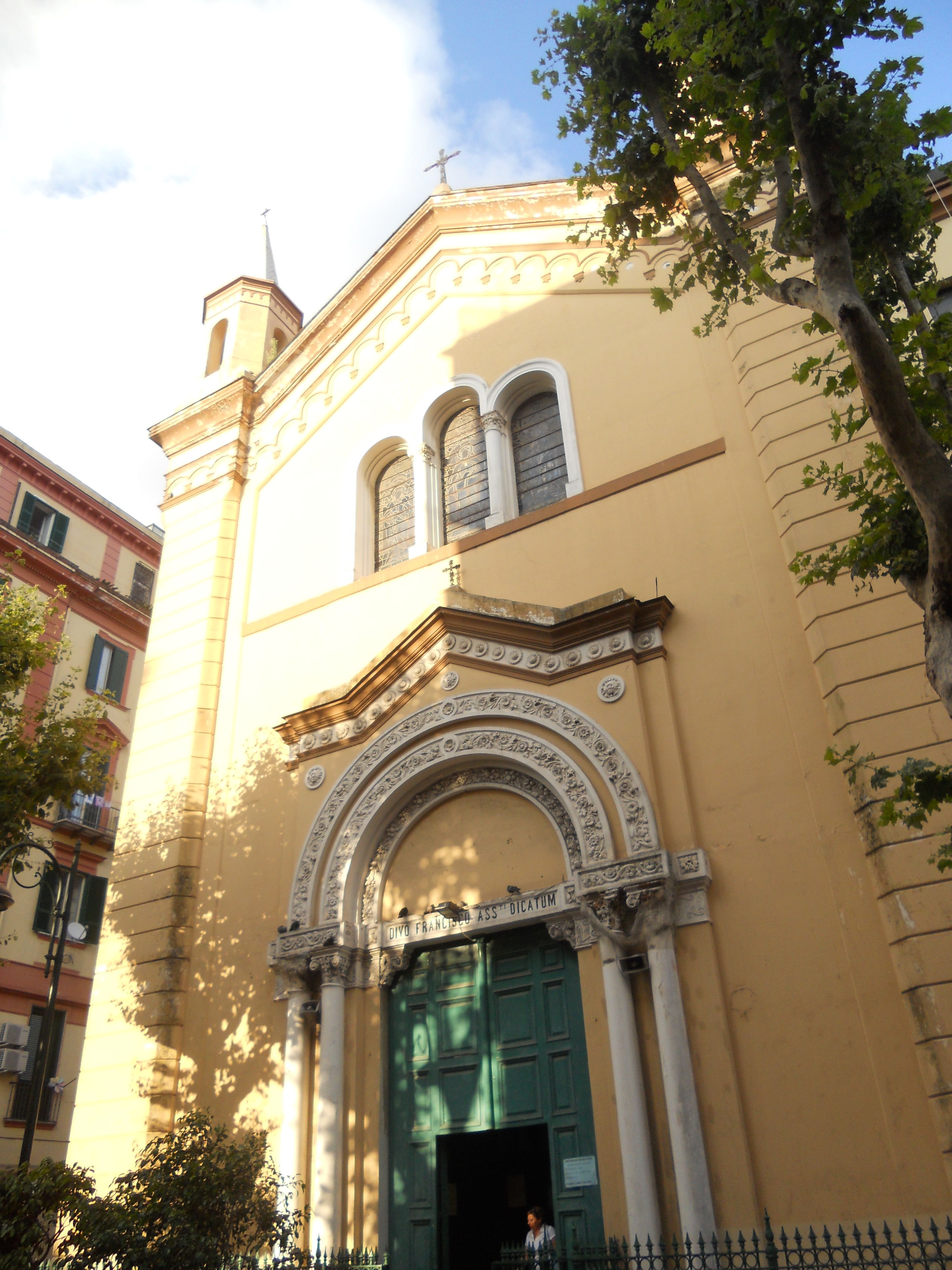 Chiesa di San Francesco d'Assisi (Napoli)